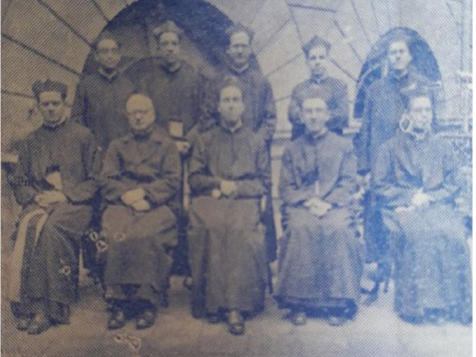 Presbítero Rojas Chaparro con sacerdotes que concelebraron con él su primera Misa.